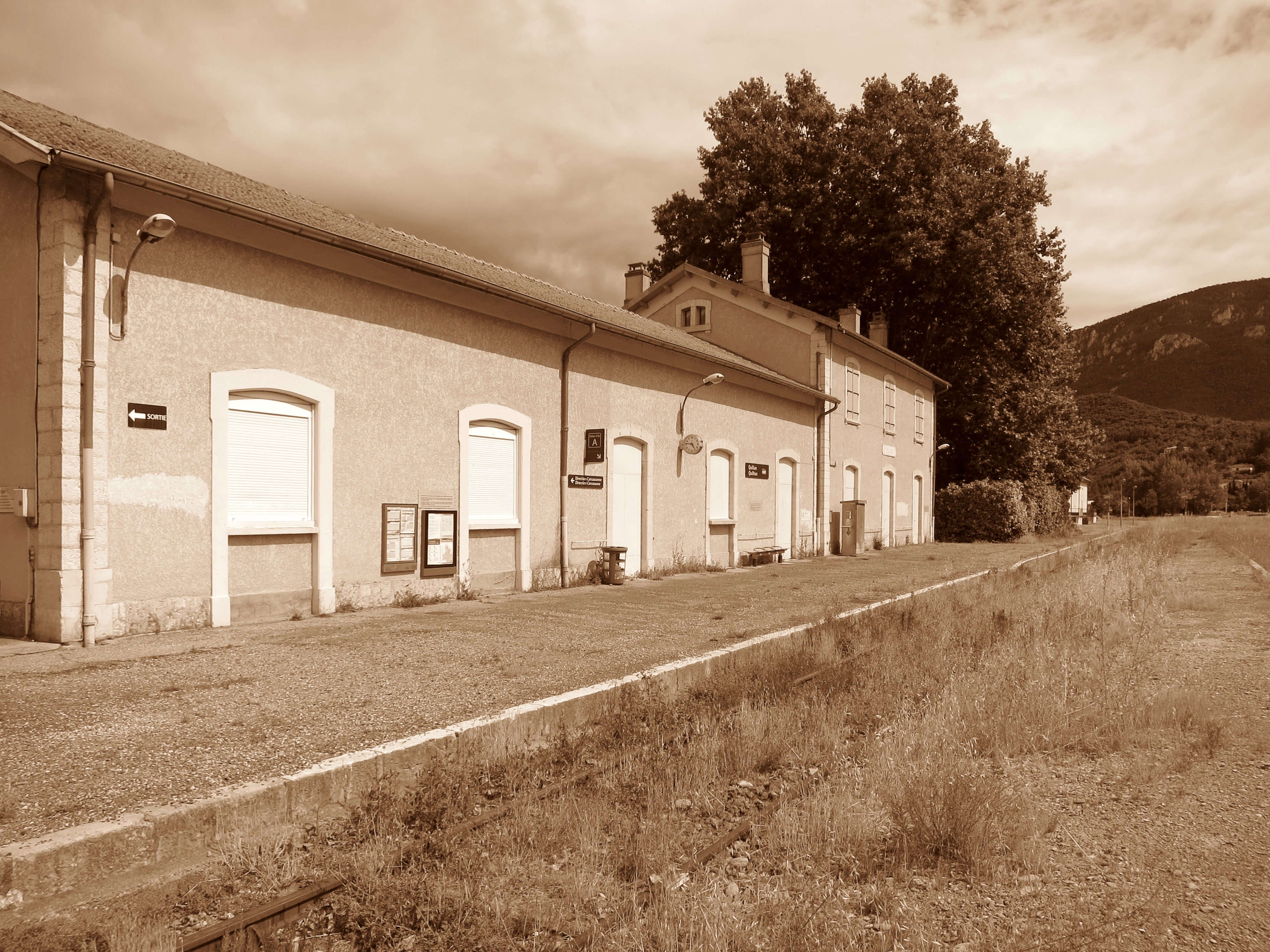 Quillan (Aude, France) - Ancien bâtiment de la gare de Quillan.